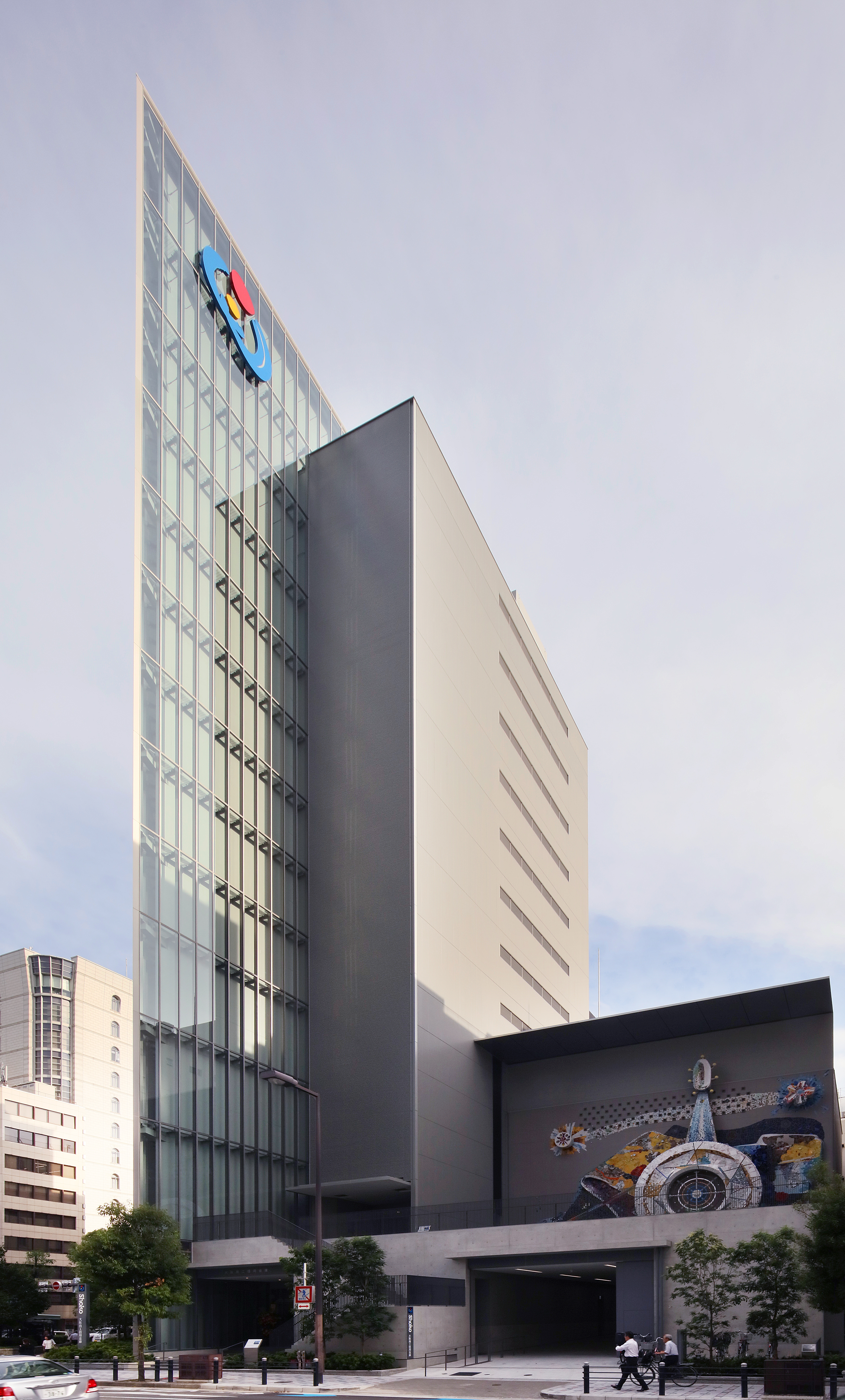 大阪商工信用金庫本店